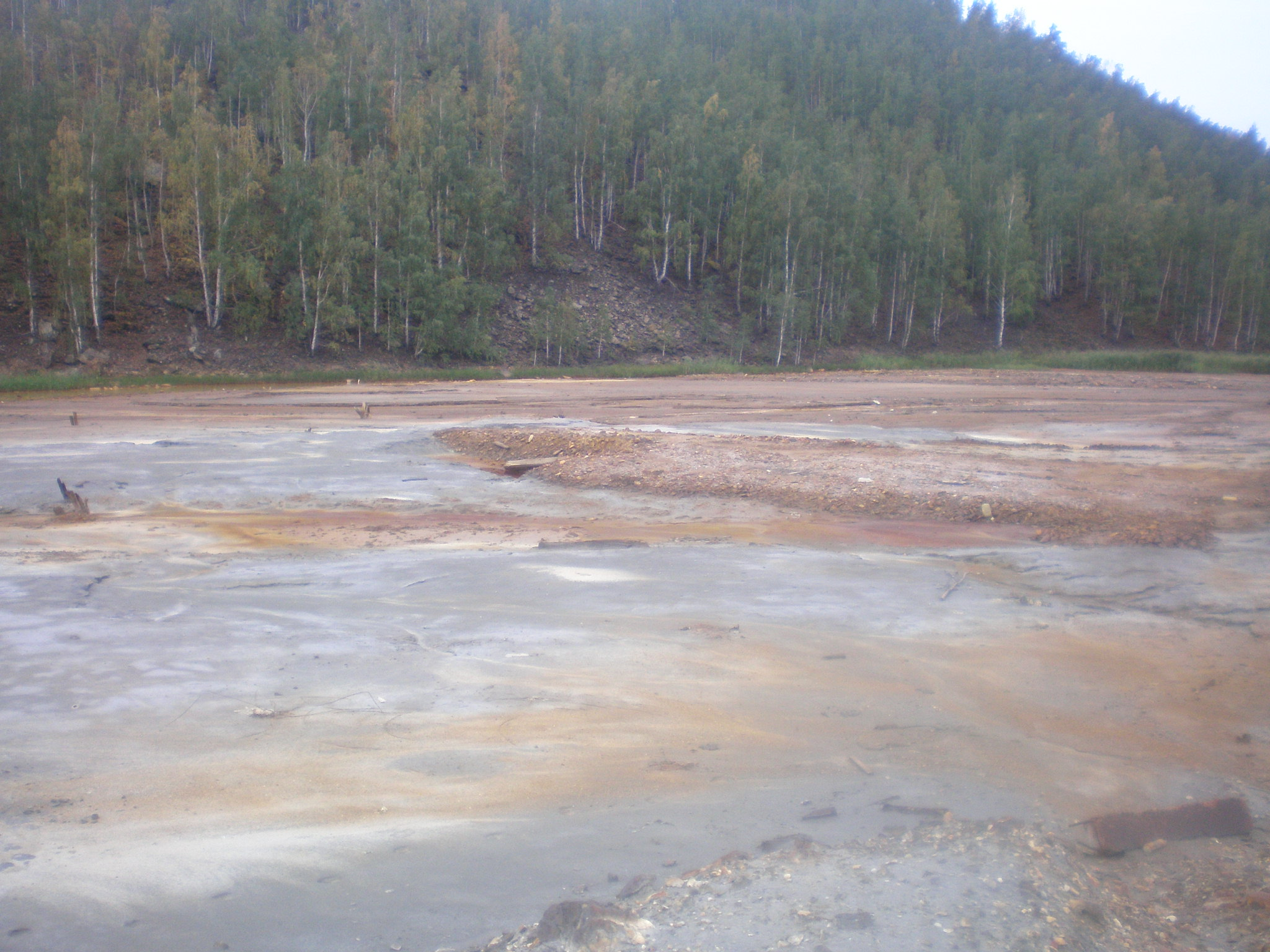 река Сак-Елга Карабаш